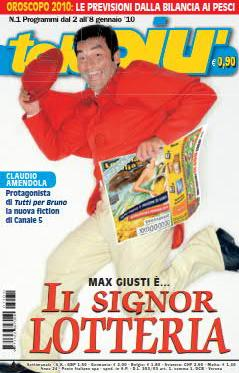 Copertina della rivista Telepiù, 2 gennaio 2010, Arnoldo Mondadori Editore.